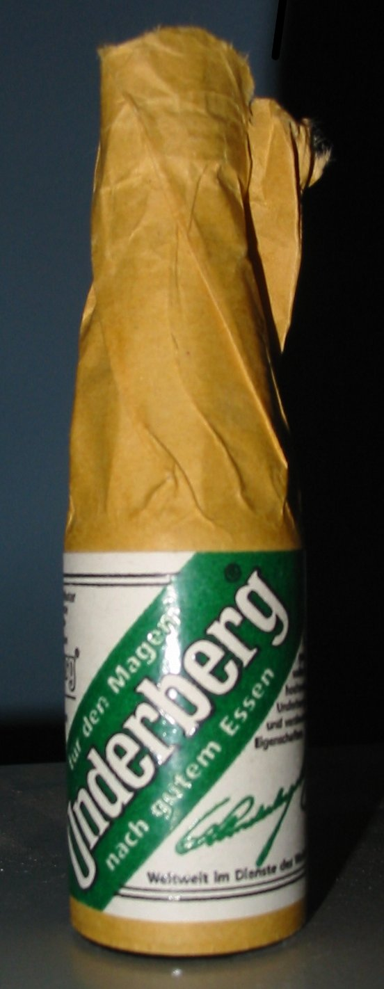 Underberg